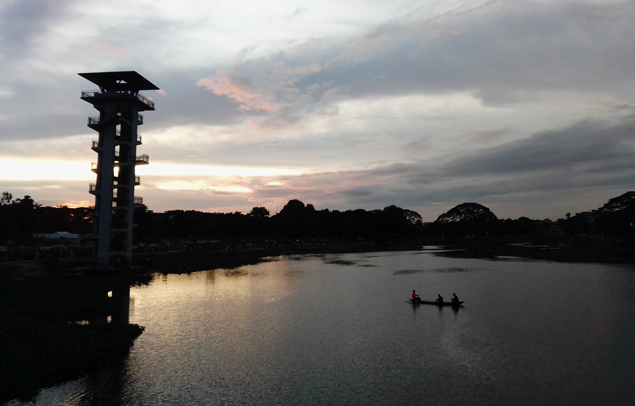 সন্ধ্যা বেলার কিশোরগঞ্জ লেকসিটি। আলোকচিত্র : আহমেদ আলী শাহ্ শাওন।